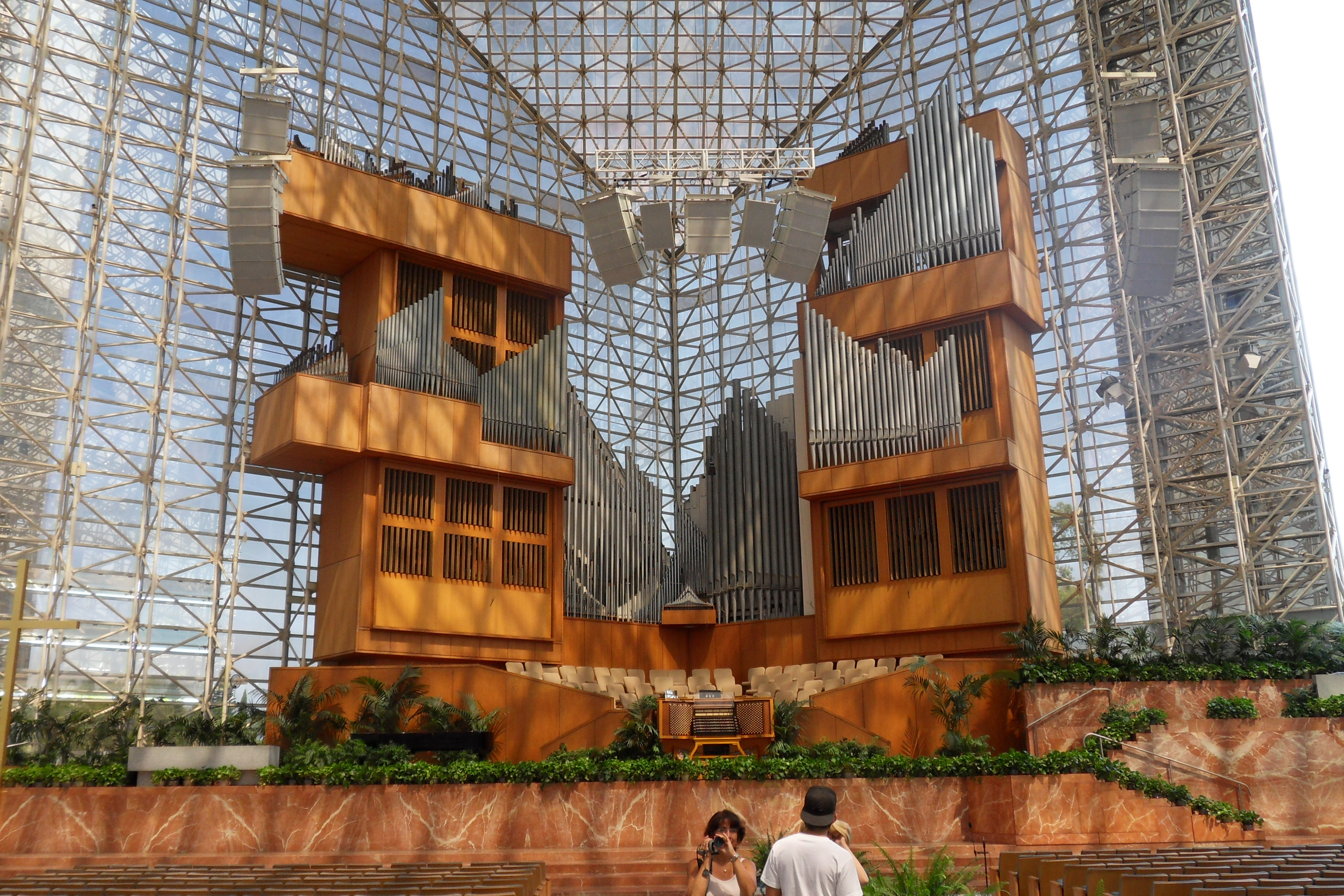 Een gedeelte van het orgel van de Crystal Cathedral.